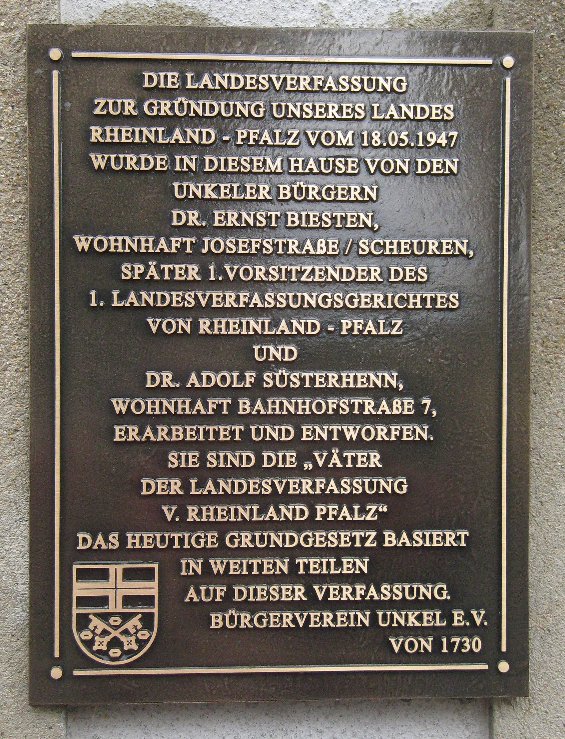 Gedenktafel am ehemaligen Wohnhaus von Adolf Süsterhenn in der Bahnhofstr. 7 in Unkel/Rhein zur Erinnerung an die Entstehung der Landesverfassung von Rheinland-Pfalz und zwei seiner Verfasser (Ernst Biesten, Adolf Süsterhenn). Siehe [1]